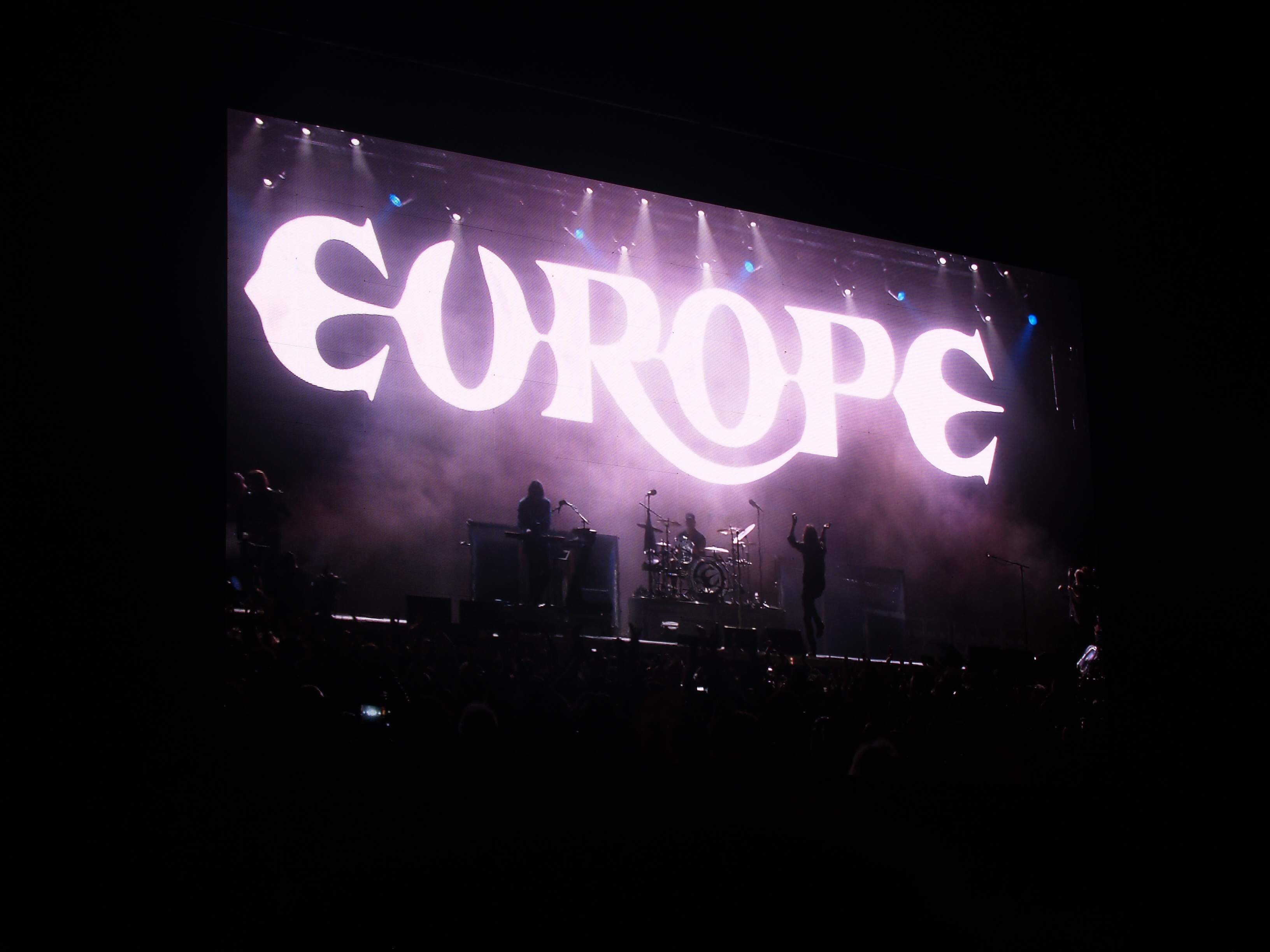 Barcelona Rock Festival 2017 - Europe